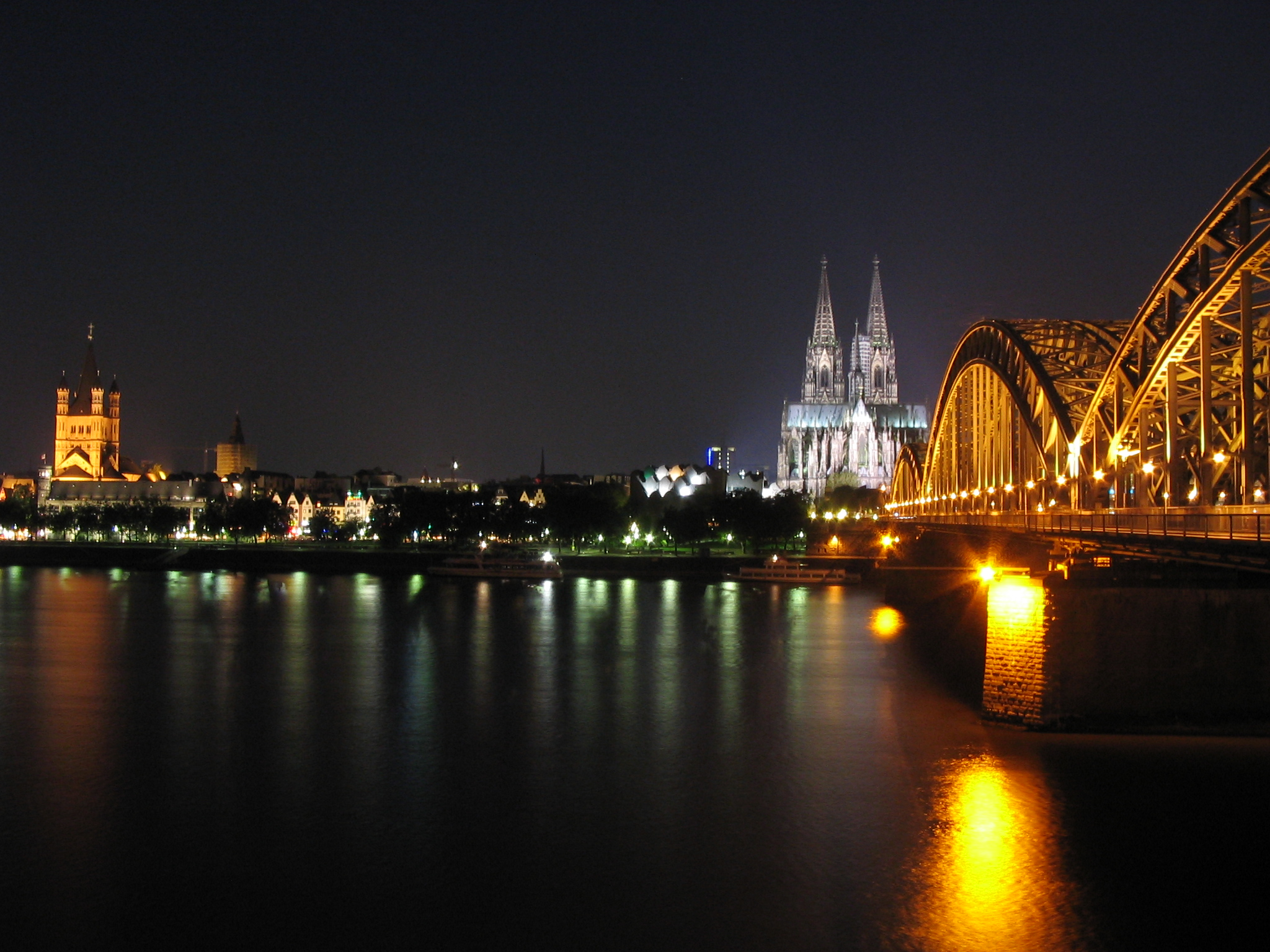 Nachtaufnahme des Kölner Doms und seiner Umgebung vom Deutzer Ufer aus, rechts die Hohenzollernbrücke